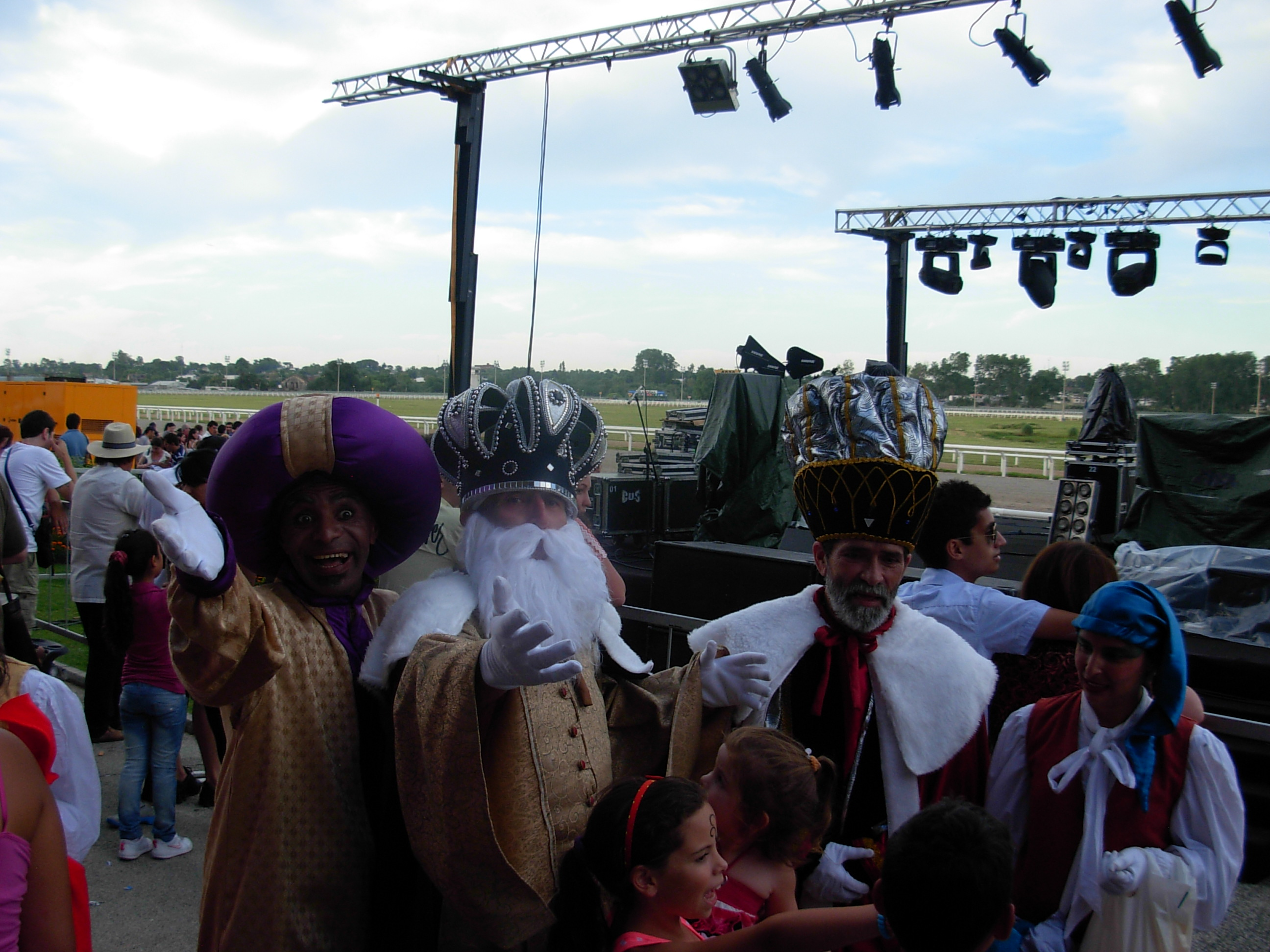 Reyes Magos presentes en el Gran Premio José Pedro Ramírez 2013 en el Hipódromo Nacional de Maroñas en Montevideo, Uruguay